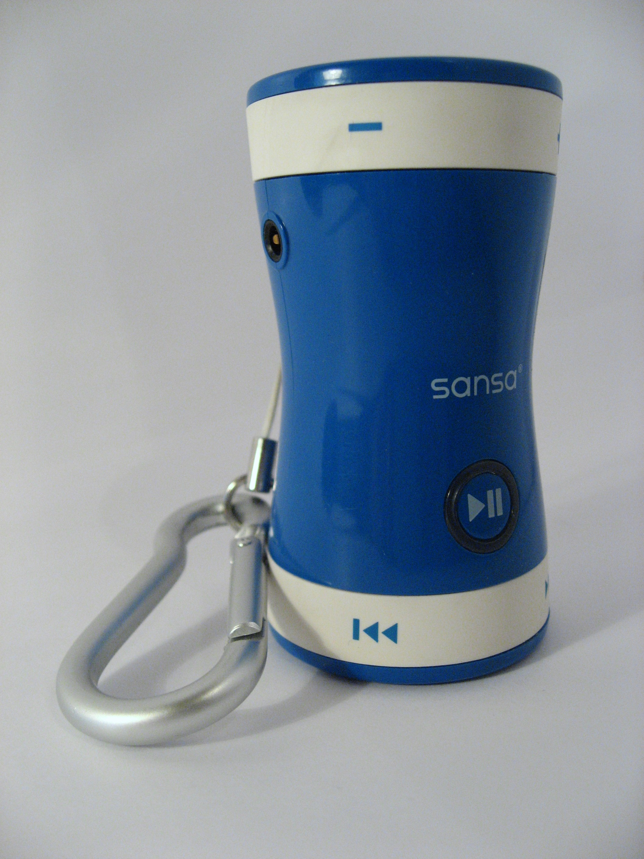 Das Bild zeigt einen Sandisk MP3 Player des Modells Sansa Shaker.